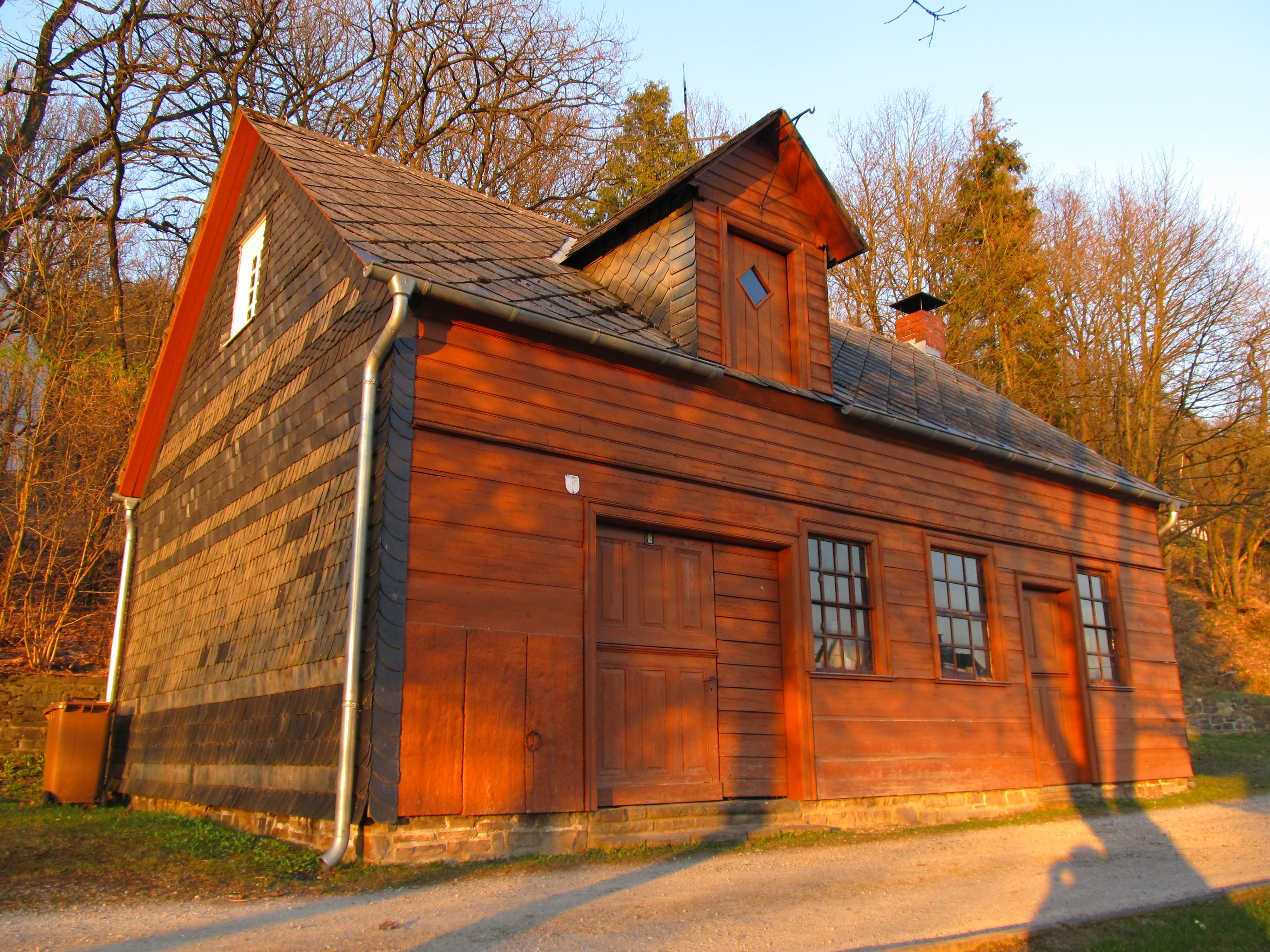 Schmiede in Wilden, Wilnsdorf, NRW.